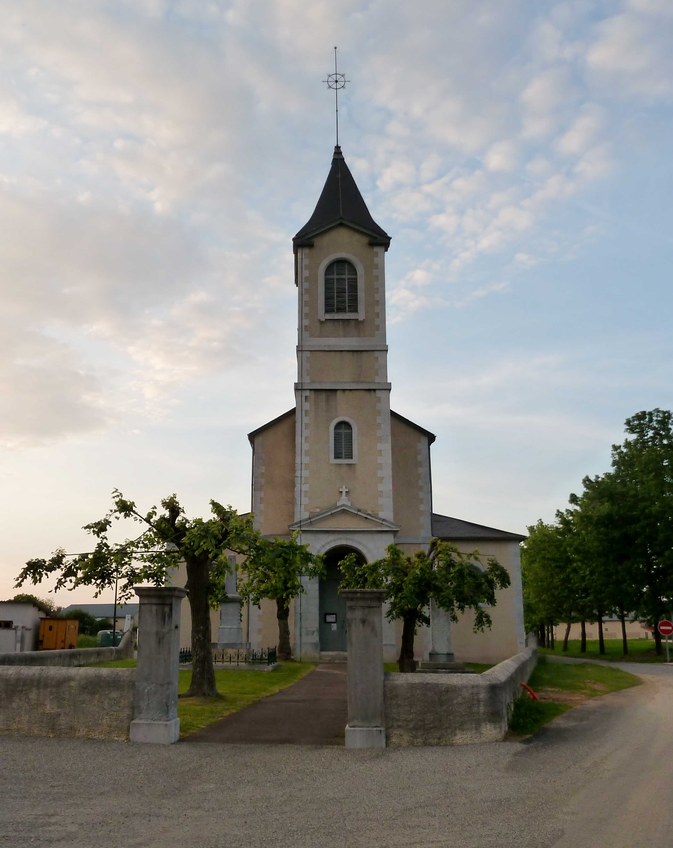 Église de Sendets (Pyrénées-Atlantiques)